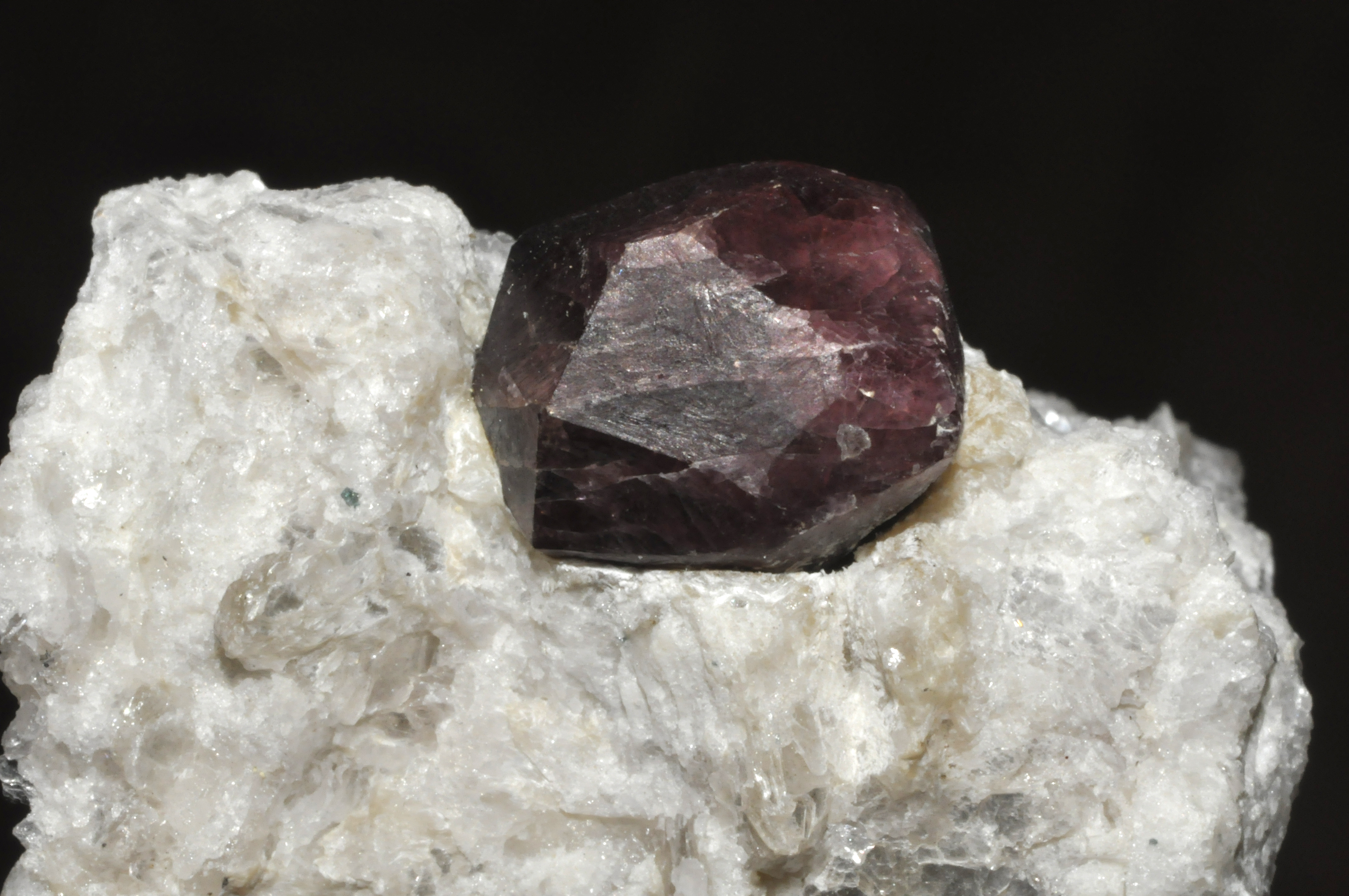 Cristal de grenat var. pyrope